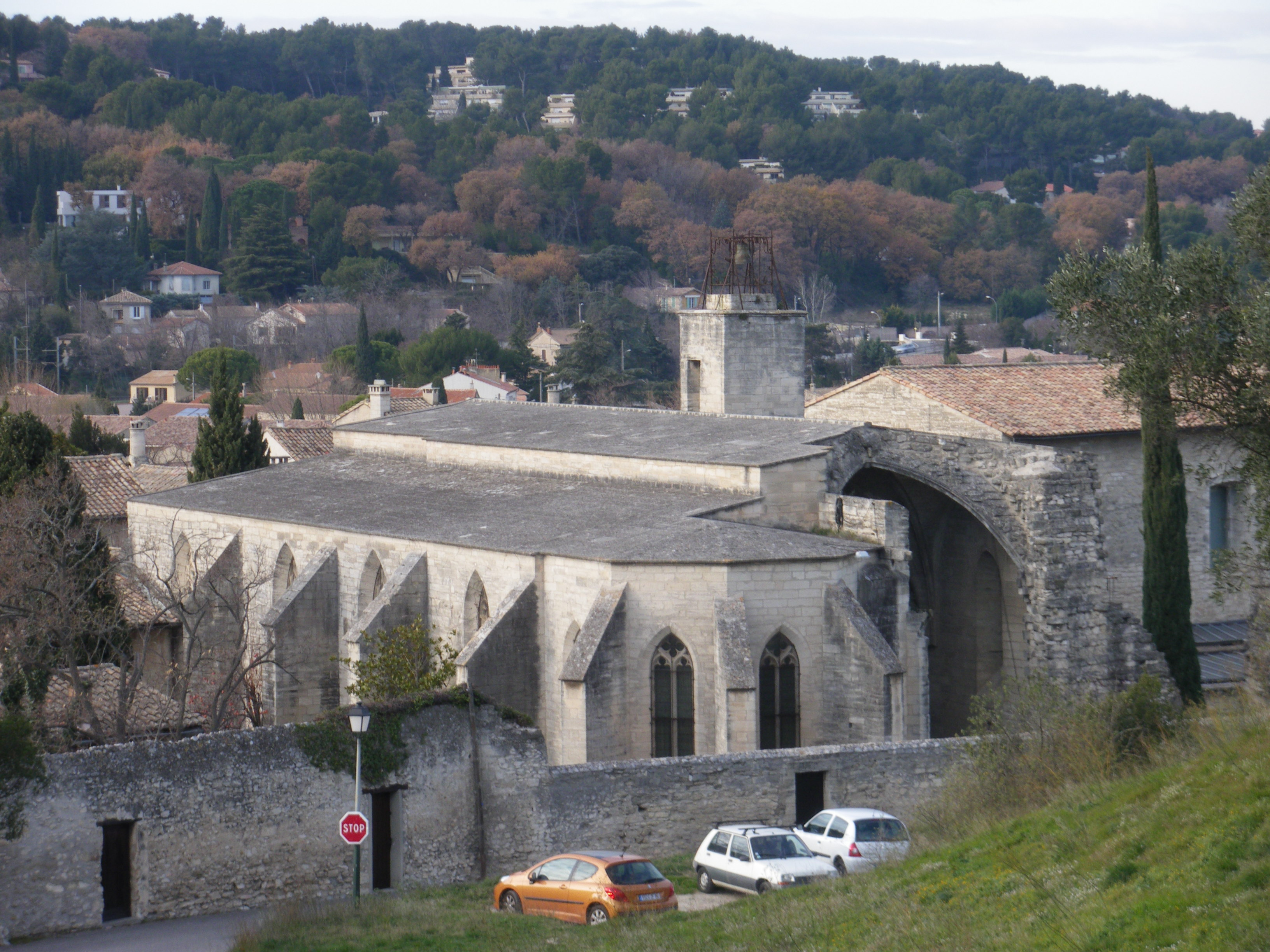 église de la Chartreuse du Val de Béndiction à Villeneuve lès Avignon, Gard